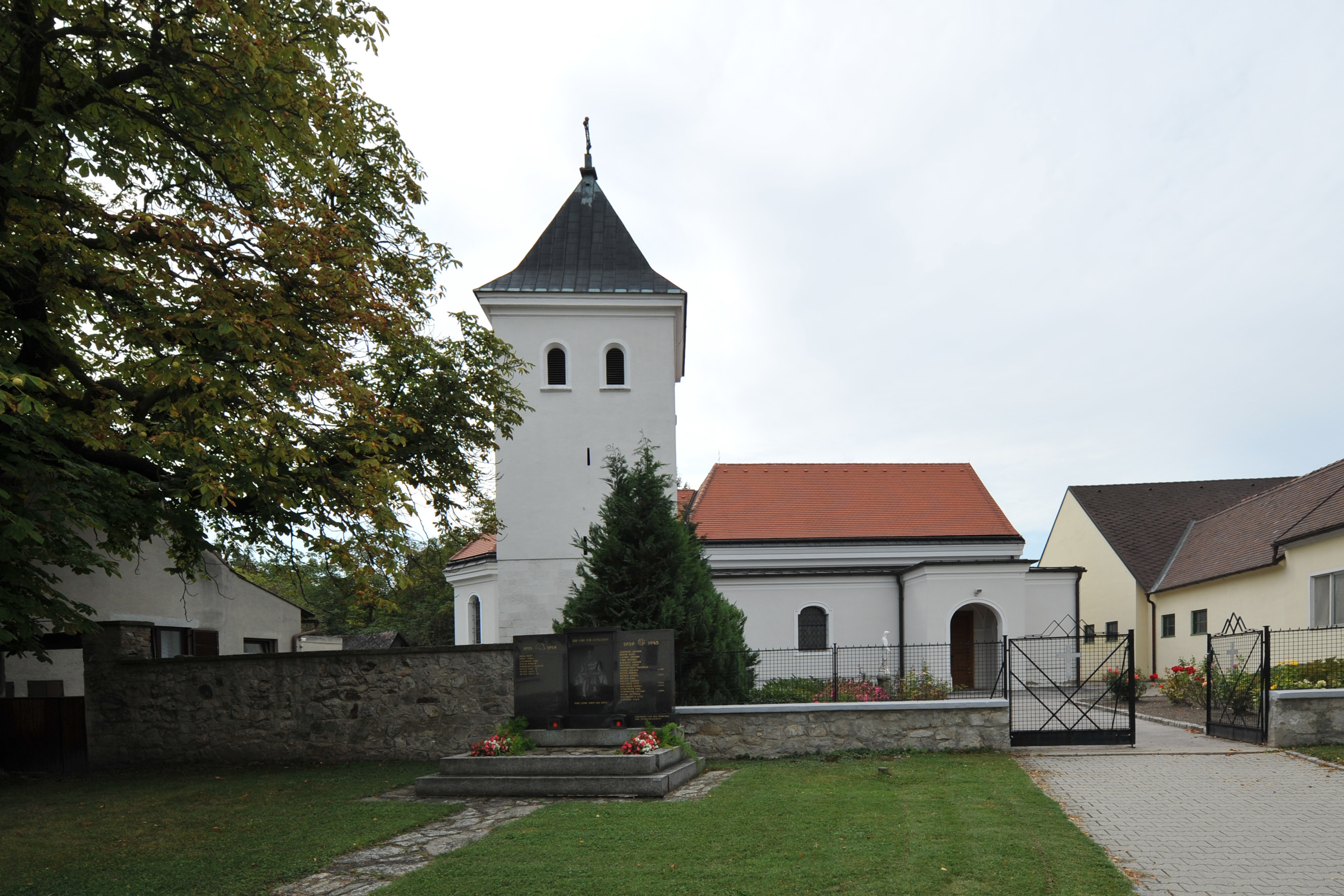 Kath. Pfarrkirche hl. Georg